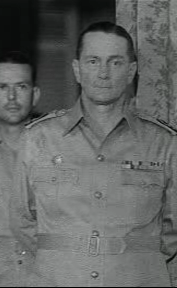 De commandant van de Nederlandse legerstrijdkrachten in Indonesië, generaal D.C. Buurman van Vreeden.